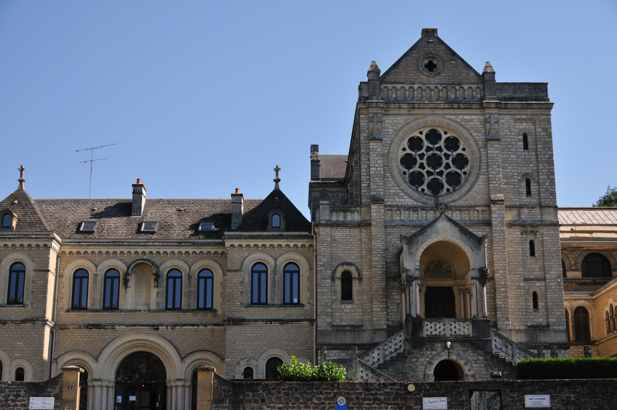 Le Carmel, Paray-le-Monial, Saône-et-Loire, France